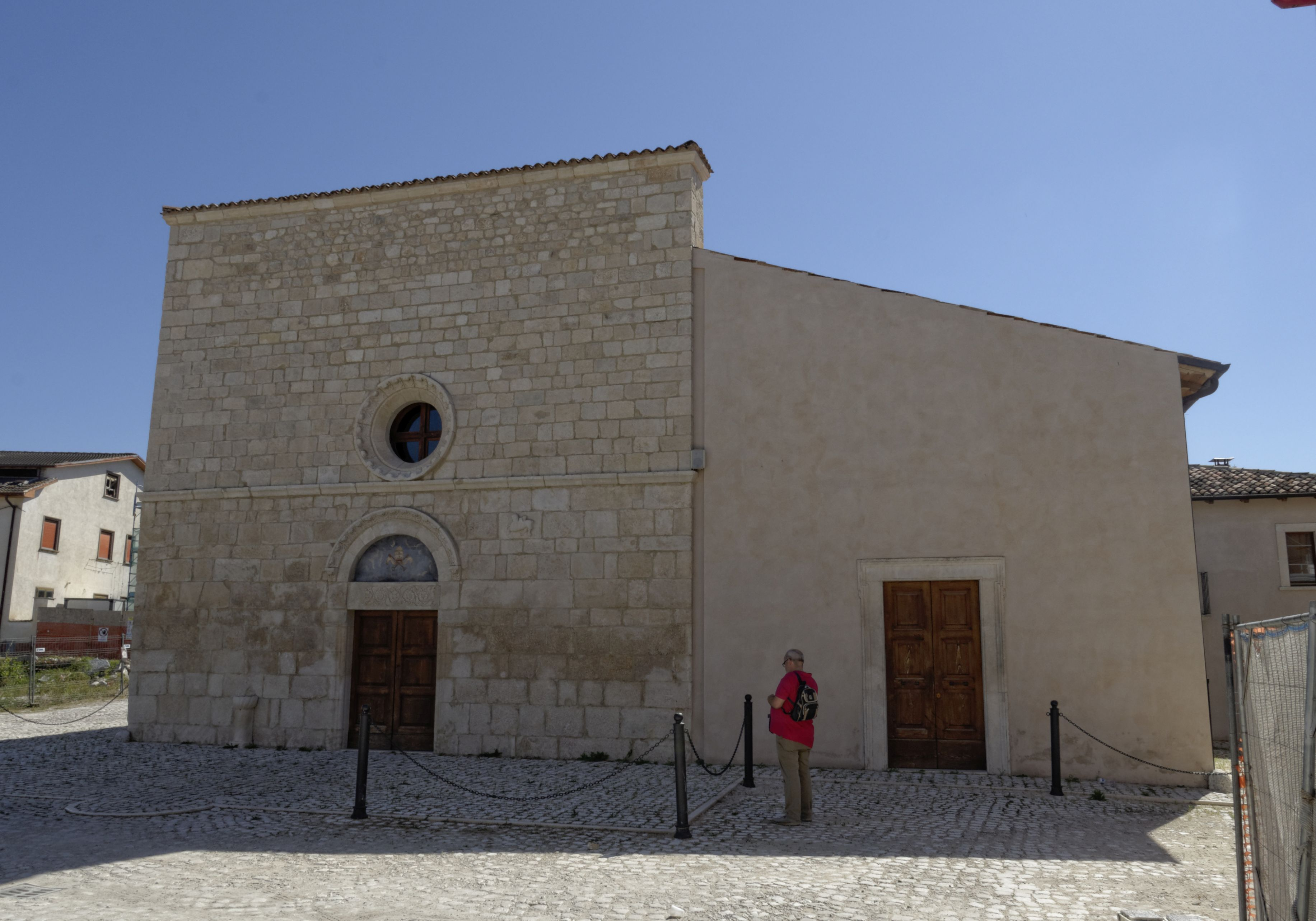 Onna (L’Aquila) 2017 Dieses Foto entstand in Zusammenarbeit mit Stadtbesichtigungen.de Die Seiten Stadtbesichtigungen.de, der dazugehörige Reise Blog sowie die Facebookseite: Stadtbesichtigungen Rom dürfen dieses Bild für Ihre Veröffentlichungen ohne den Hinweis auf Wikipedia, Commons bzw der Lizenz verwenden. Die Verantwortlichen habe von mir (Ra Boe) die Originaldaten zur freien Verfügung übermittelt bekommen.